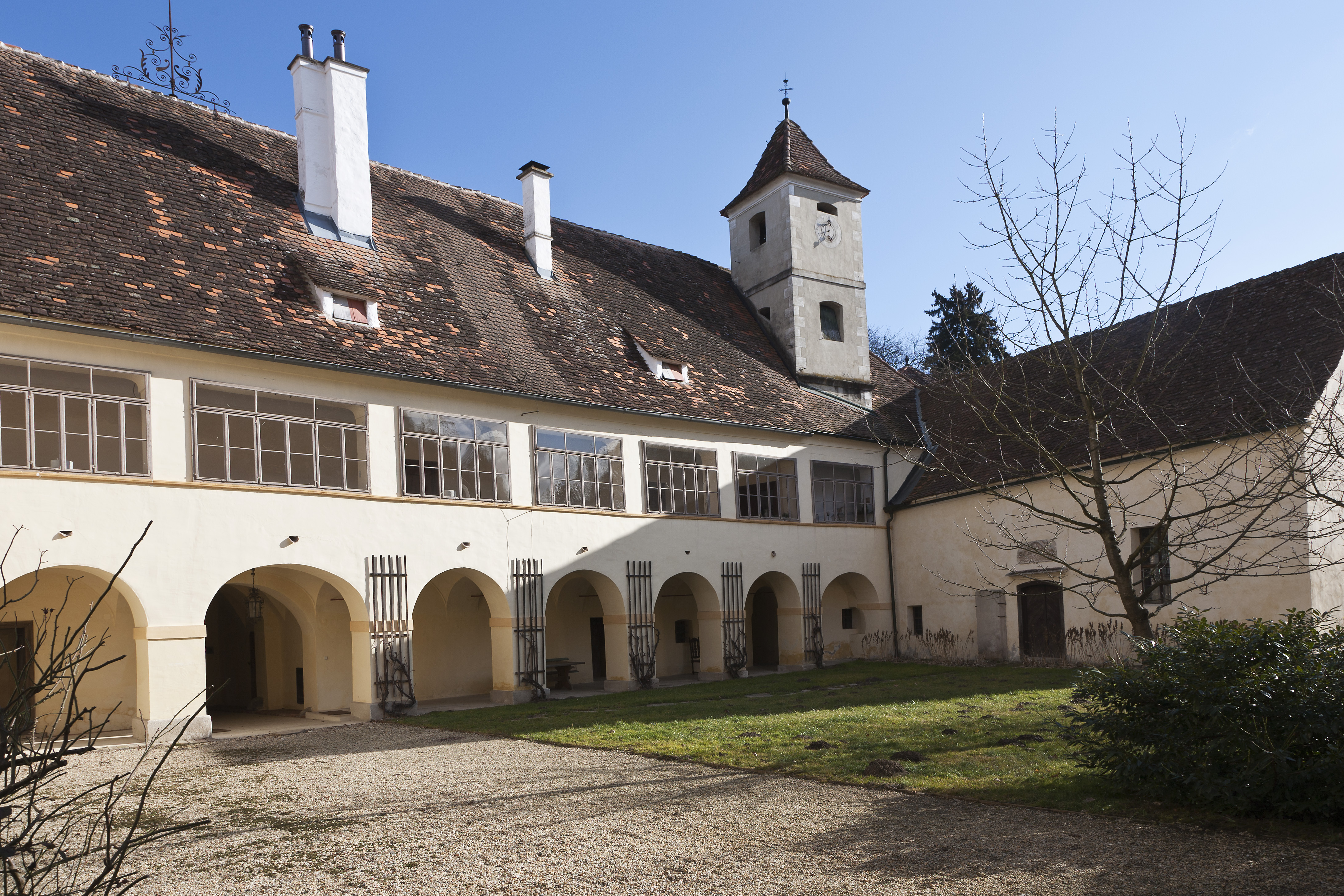 Schloss Feistritzbei Ilz_Innenhof von Westen